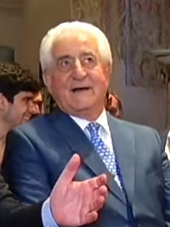 Santiago Martín, "El Viti", 2015.